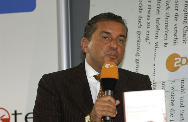 Michel Friedman. Dieses Fotos dürfen Sie honorarfrei nutzen, wenn Sie folgenden credit beachten: Copyright: Das blaue Sofa / Club Bertelsmann.